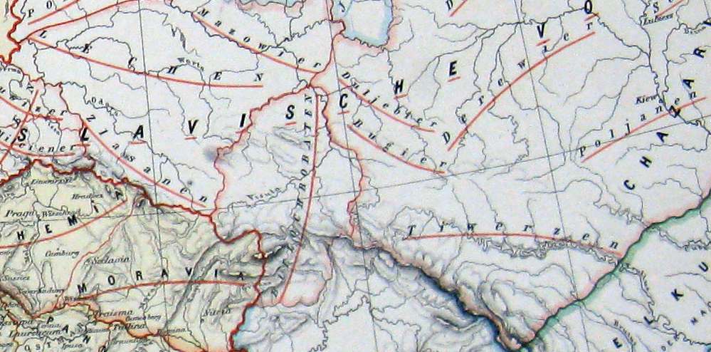 Lokalizacja Białochorwatów